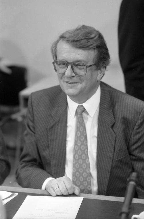 10.1.1991 Sitzung der FDP-Bundestagsfraktion im Bundeshaus (Neues Abgeordneten-Hochhaus).